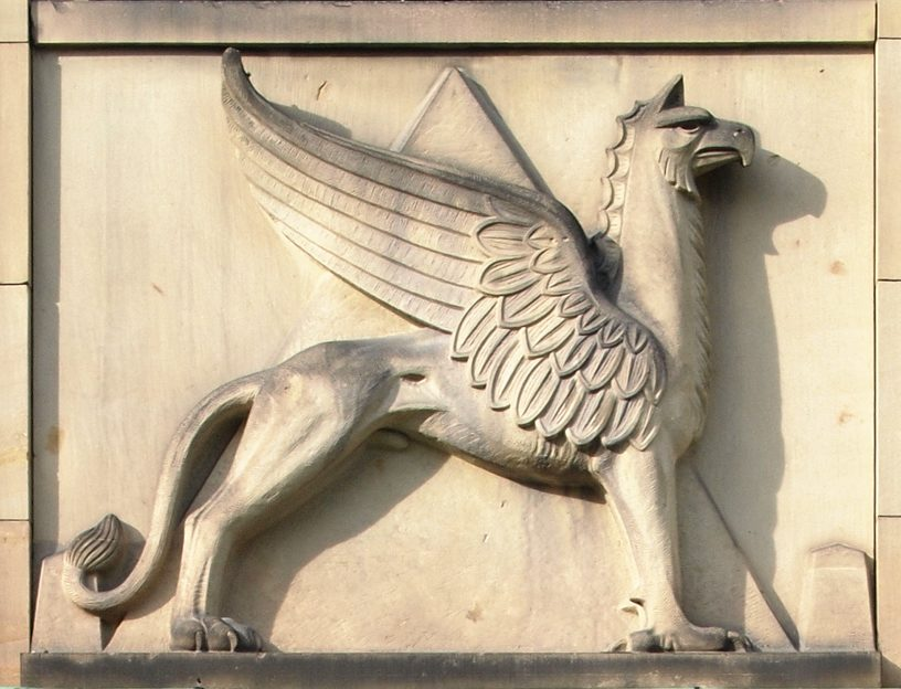 Greifrelief am Rathaus West in Karlsruhe, ehemals Karlsruher Versicherungen. Dahinter ist die Karlsruher Pyramide dargestellt.